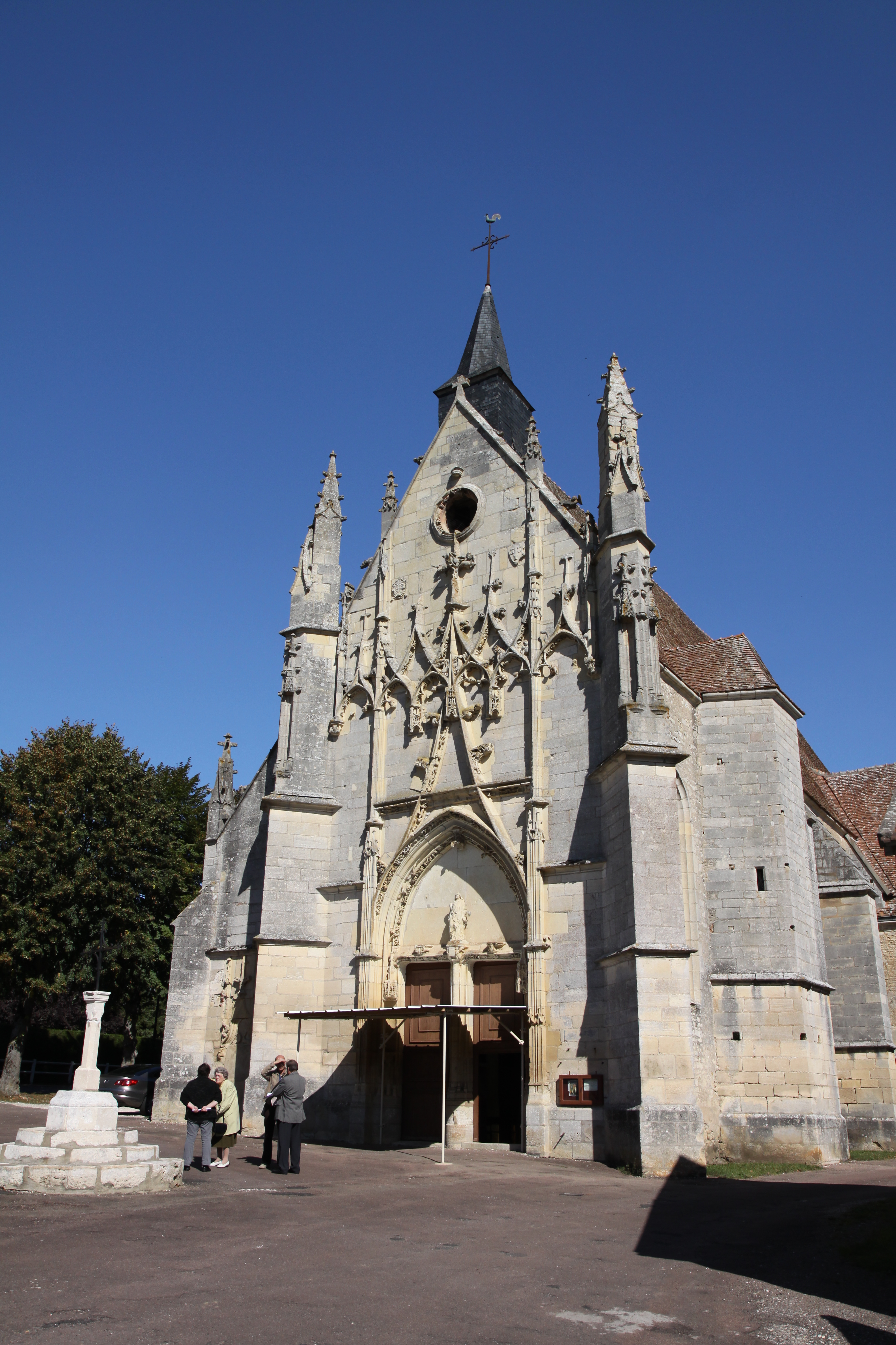 vue d'ensemble de l'église